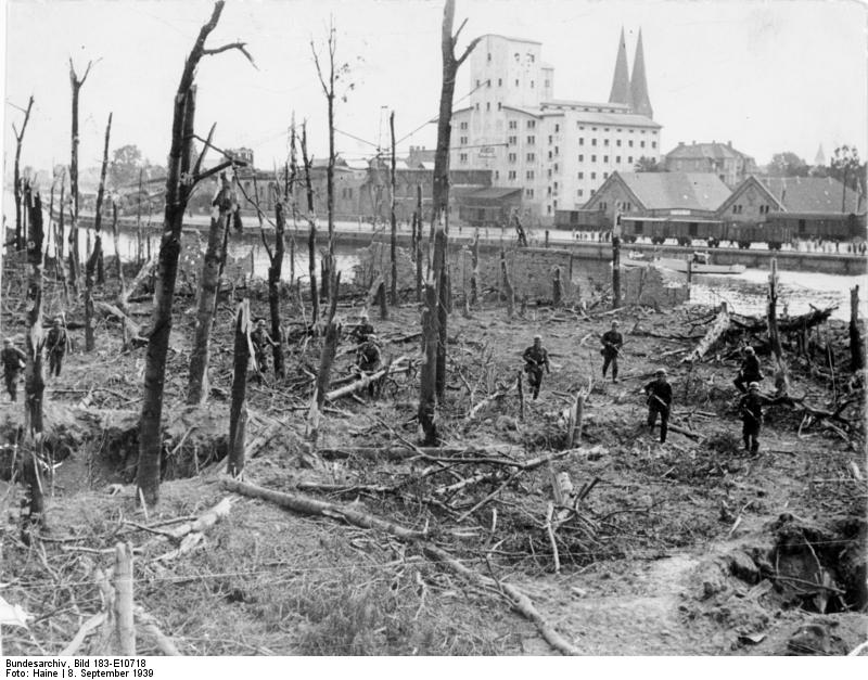 Die Einnahme der Wester-Platte Bild Nr. A 70080, 9.9.39, Bild: Haine Ein Teil des Waldes auf der Westerplatte, der nun vollkommen zerschossen ist. Hier leisteten die Polen hartnäckigen Widerstand, der erst durch die Tapferkeit, mit dem die deutschen Truppen zum Sturm antraten, gezwungen wurde. PBZ Fr. OKW Freigegeben Hauptreferent Bildpresse ADN-Text Zentralbild II.Weltkrieg 1939 -1945, Polenfeldzug Nach der Einnahme der Westerplatte im Danziger Hafen am 8.9.1939, deutsche Truppen durchkämmen das Gelände der Westerplatte. Scherl Bilderdienst